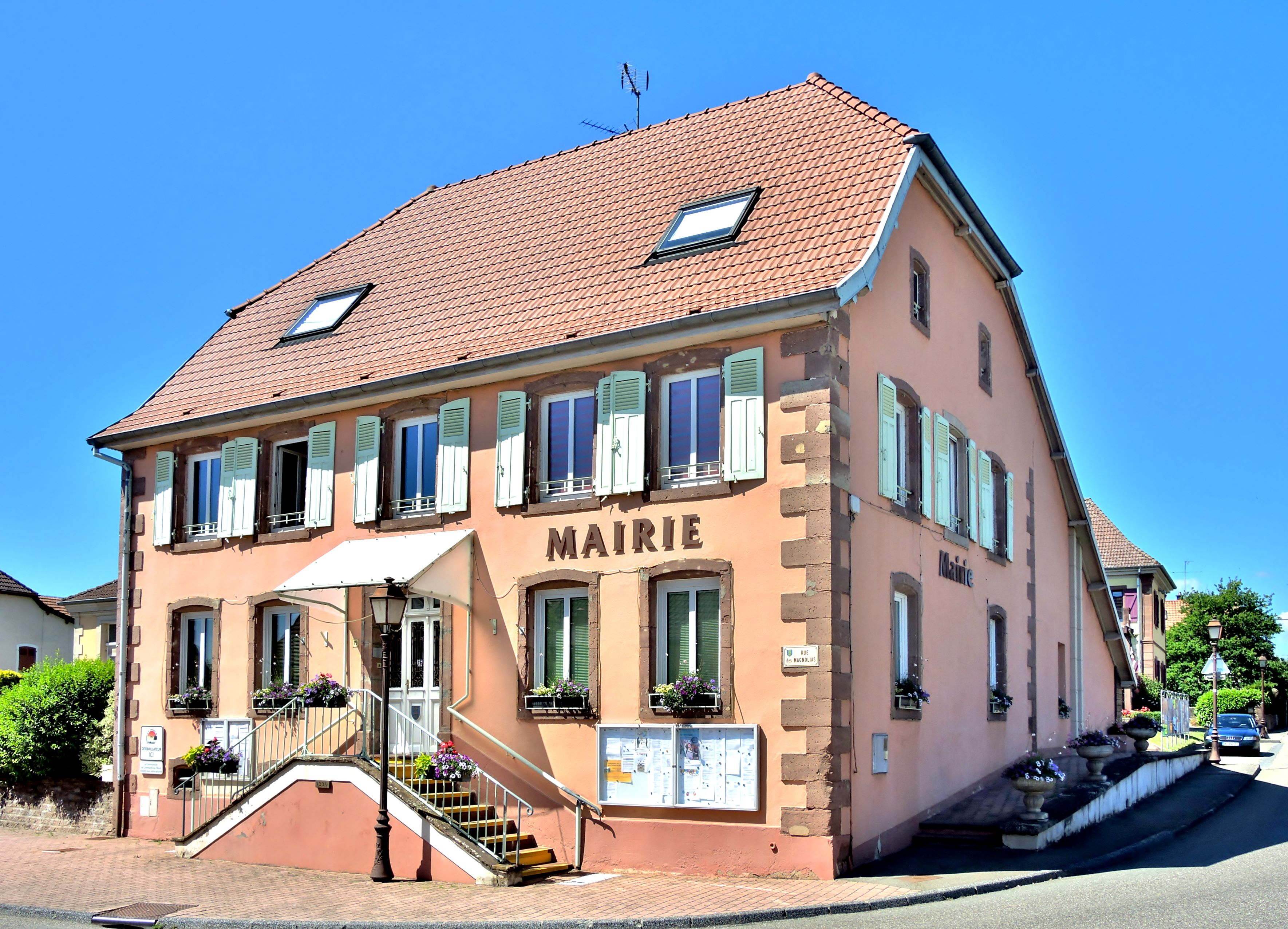 Mairie de Bessoncourt. Territoire de Belfort